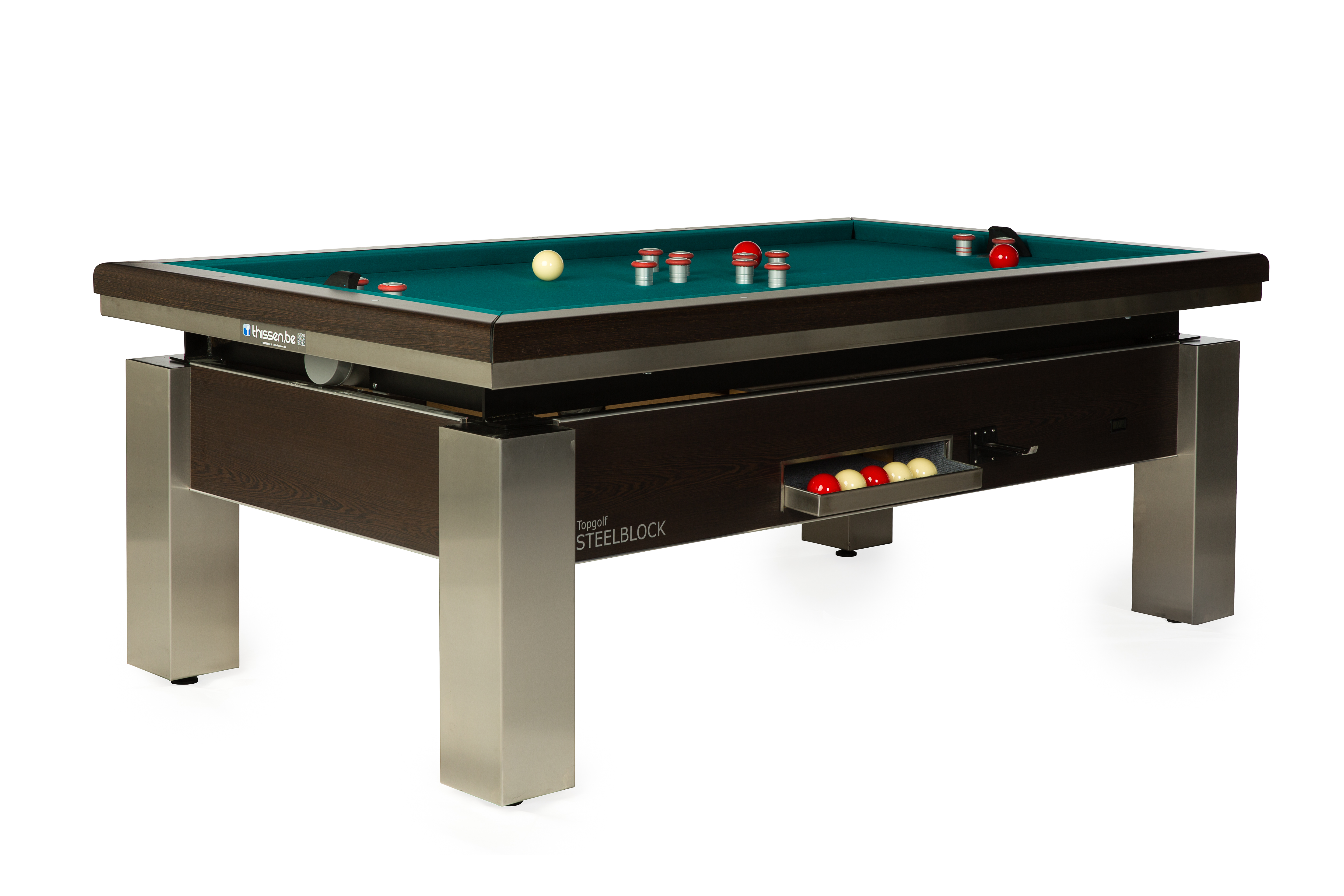 Steelblock is in de biljartwereld reeds jaren een begrip maar voor het eerst toegepast bij Golfbiljart.